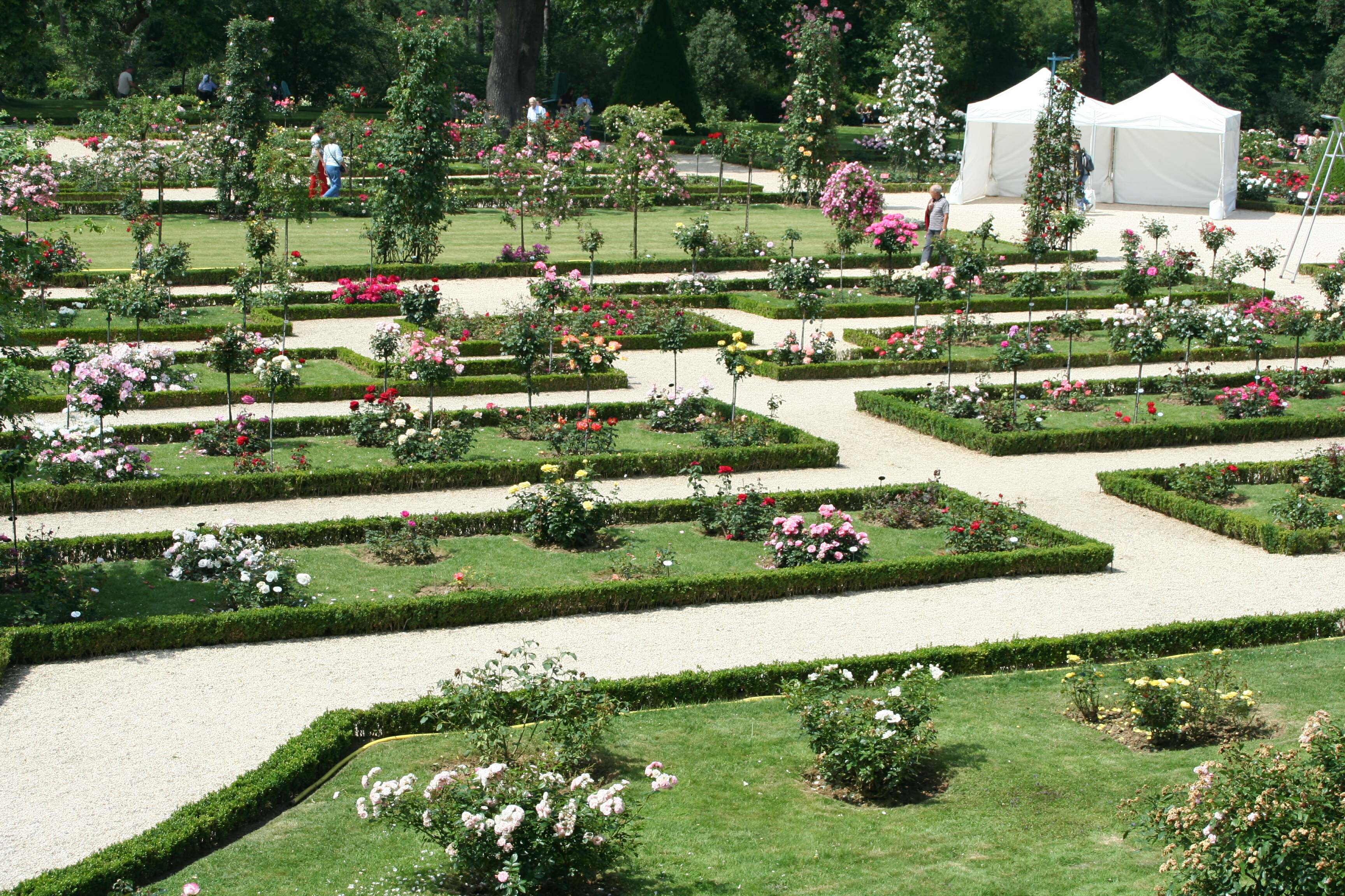 Roseraie classique de Bagatelle Paris (France)